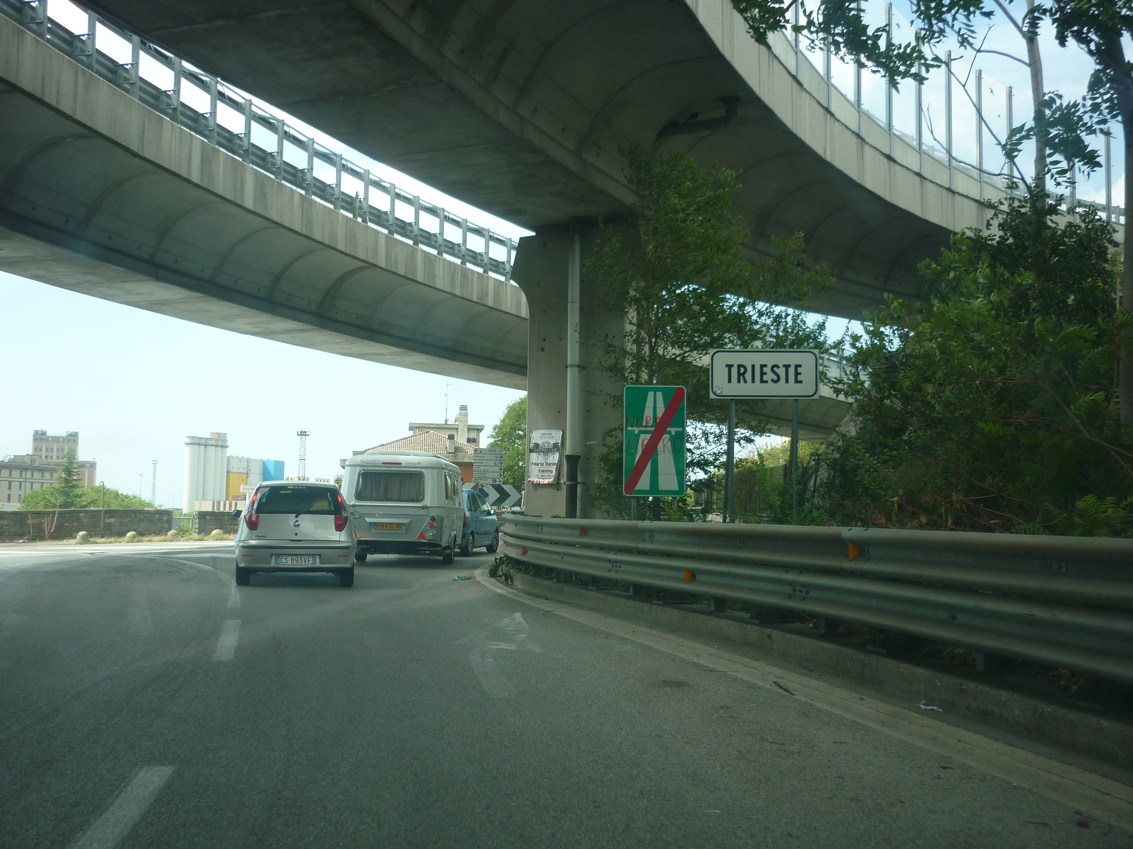 Il termine della strada statale 202 "Triestina" a Trieste.